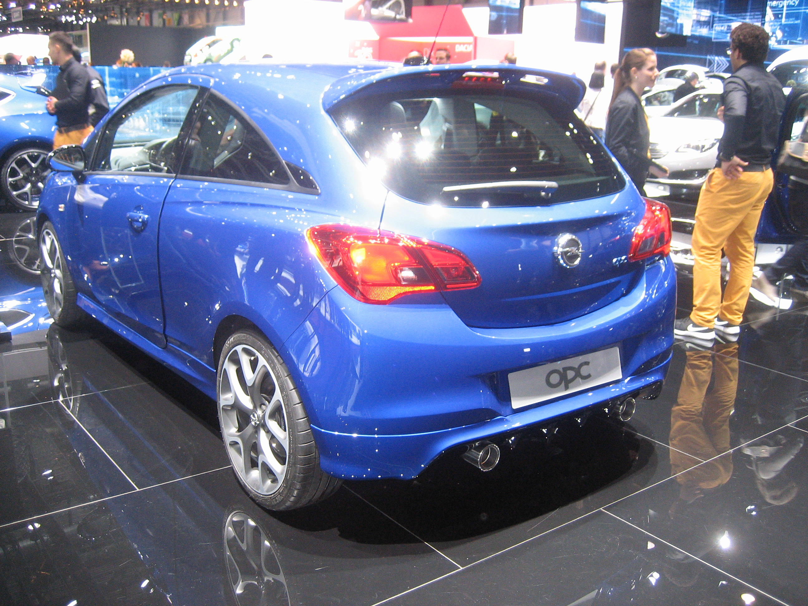 Opel Corsa E OPC Salon de Genève 2015